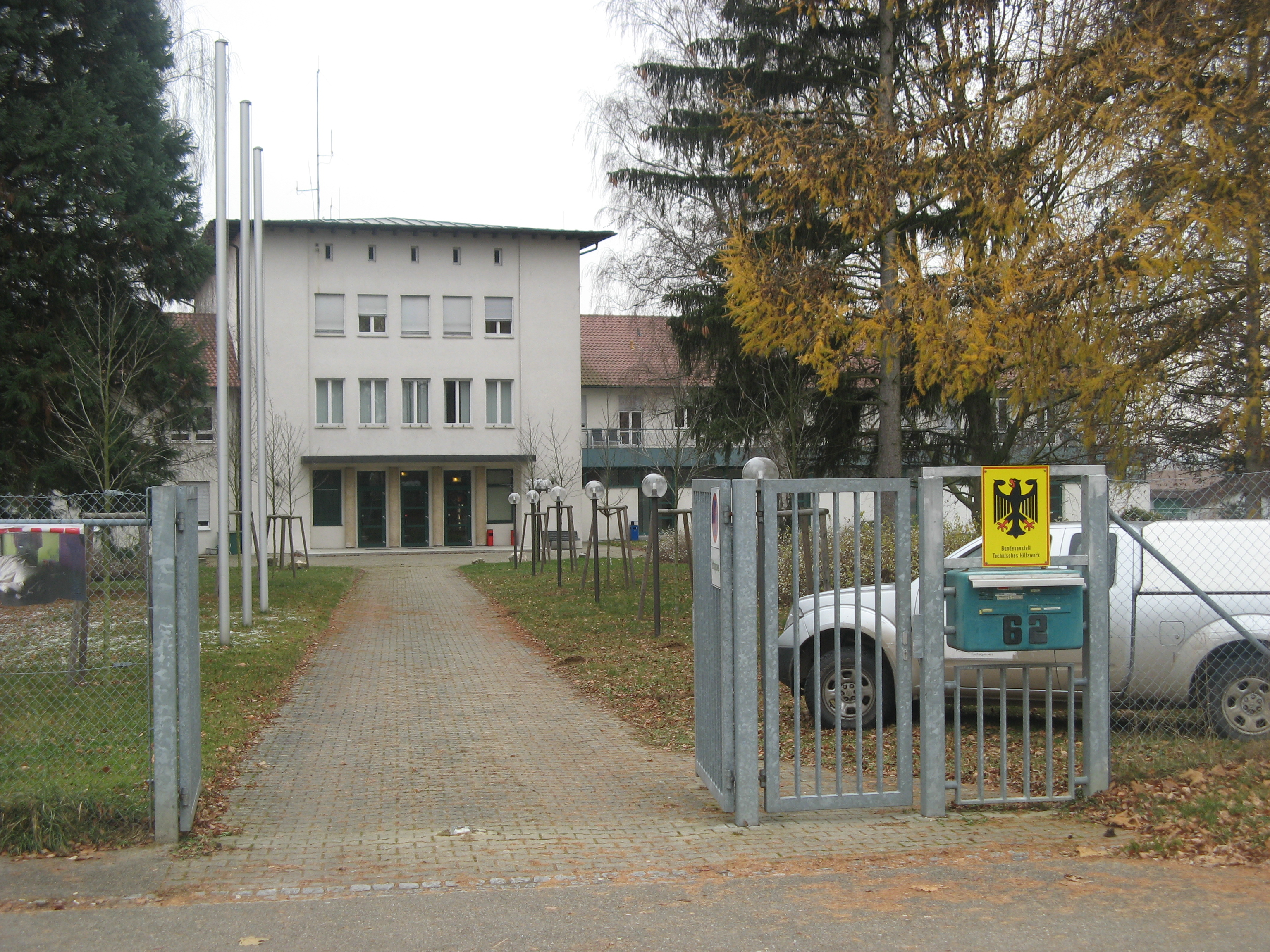 THW Bundesschule Neuhausen auf den Fildern (Ehemalige Katastophenschutzschule des Ladens Baden Württemberg